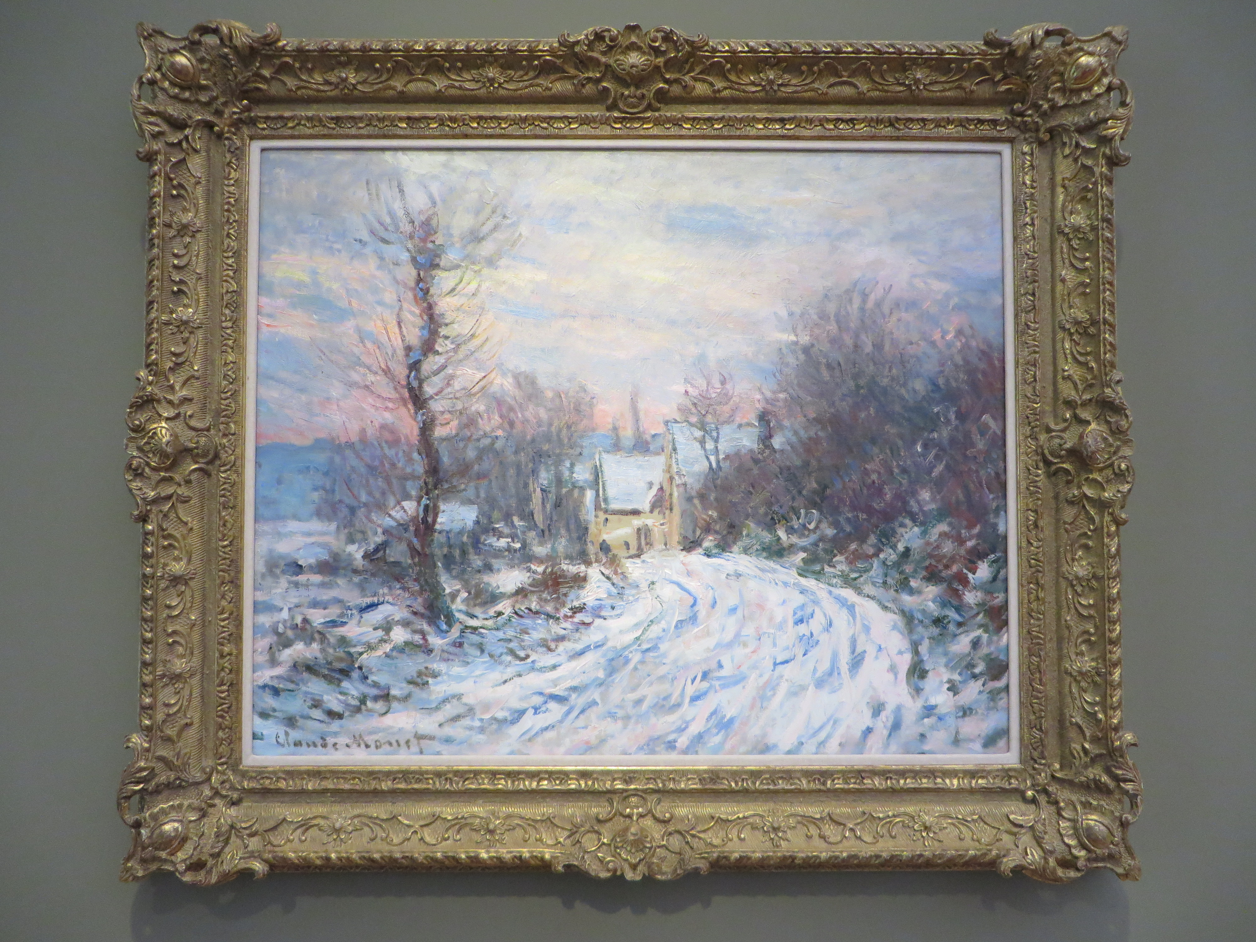 Barberini Museum Potsdam. Ausstellung „Impressionismus - Die Kunst der Landschaft“, Frühjahr 2017. Claude Monet: The Road to Giverny, Winter (1885).